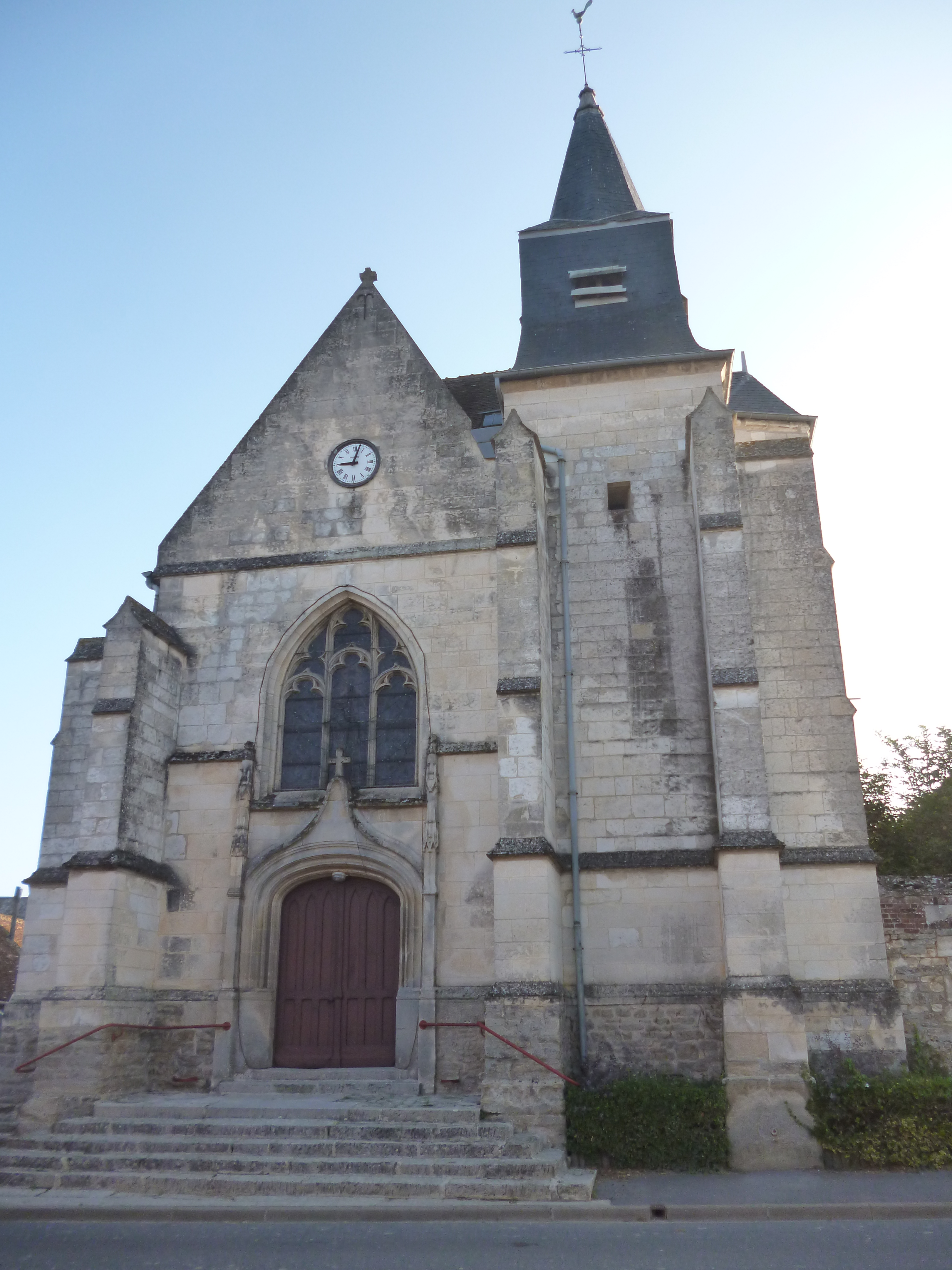 L'église Notre-Dame de Noroy (Oise), monument historique. .